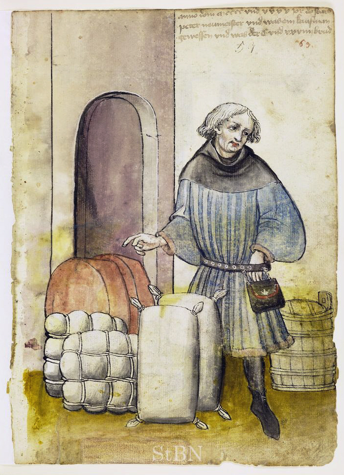 peter (Peter) neumeister (Neumeister) , kaufman (Kaufmann) Transkription und weitere Informationen